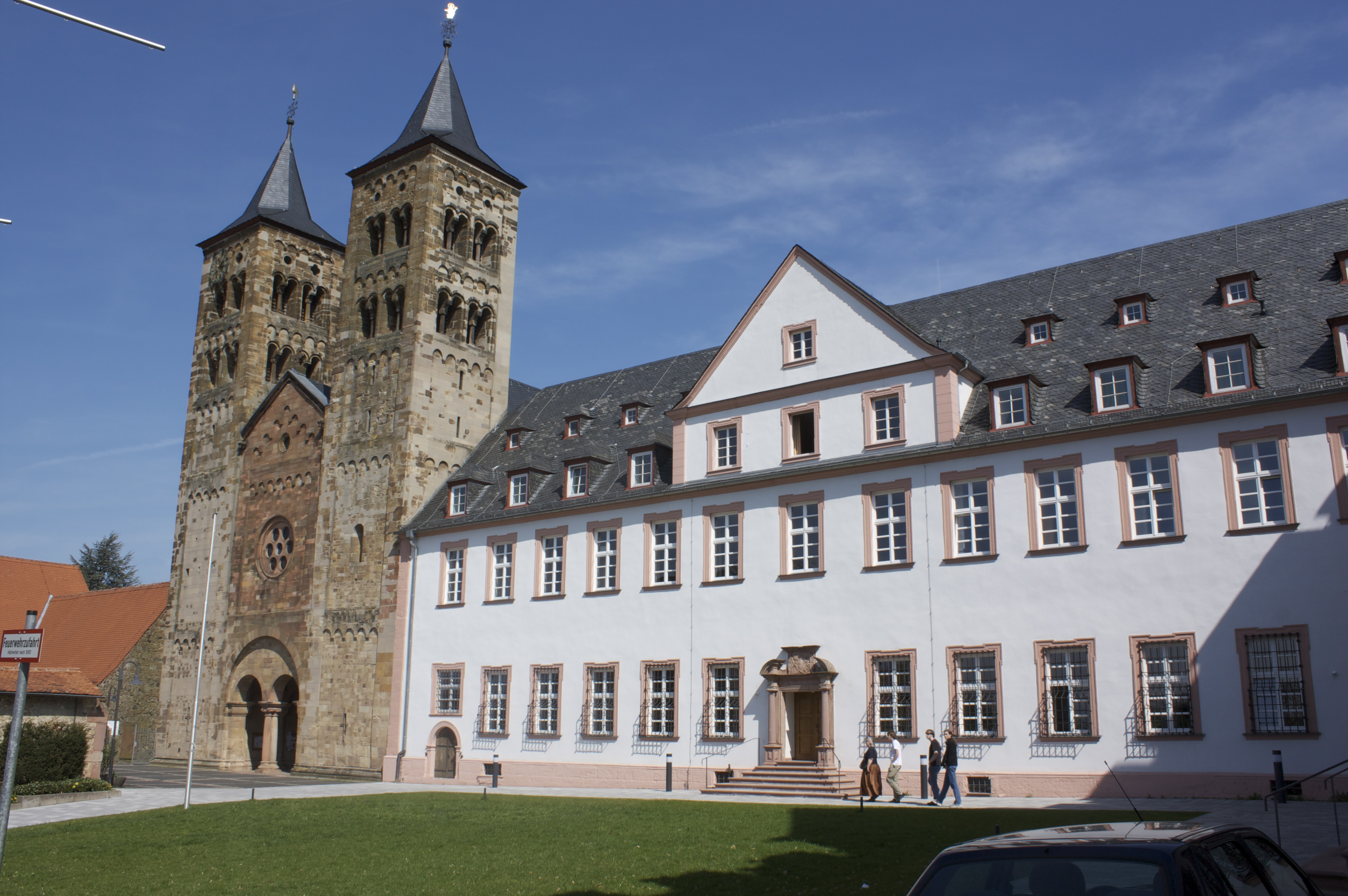 Ilbenstadt Basilika and Convent.